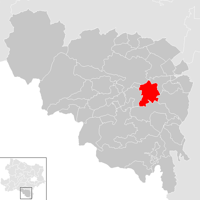 Bezirk Neunkirchen